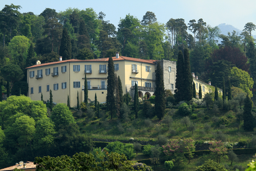 Villa Serbelloni, Bellagio, Como, Lombardia, Italy